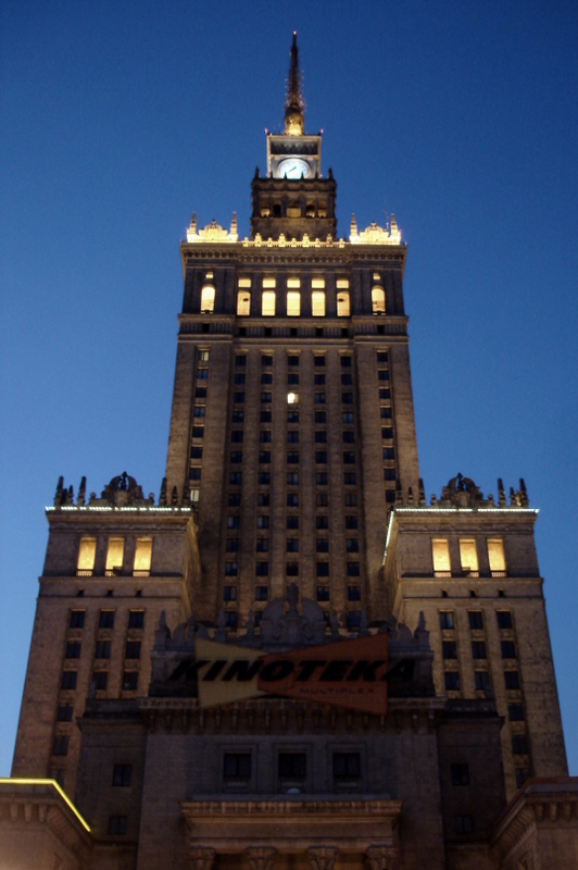 Warszawa, Pałac Kultury i Nauki